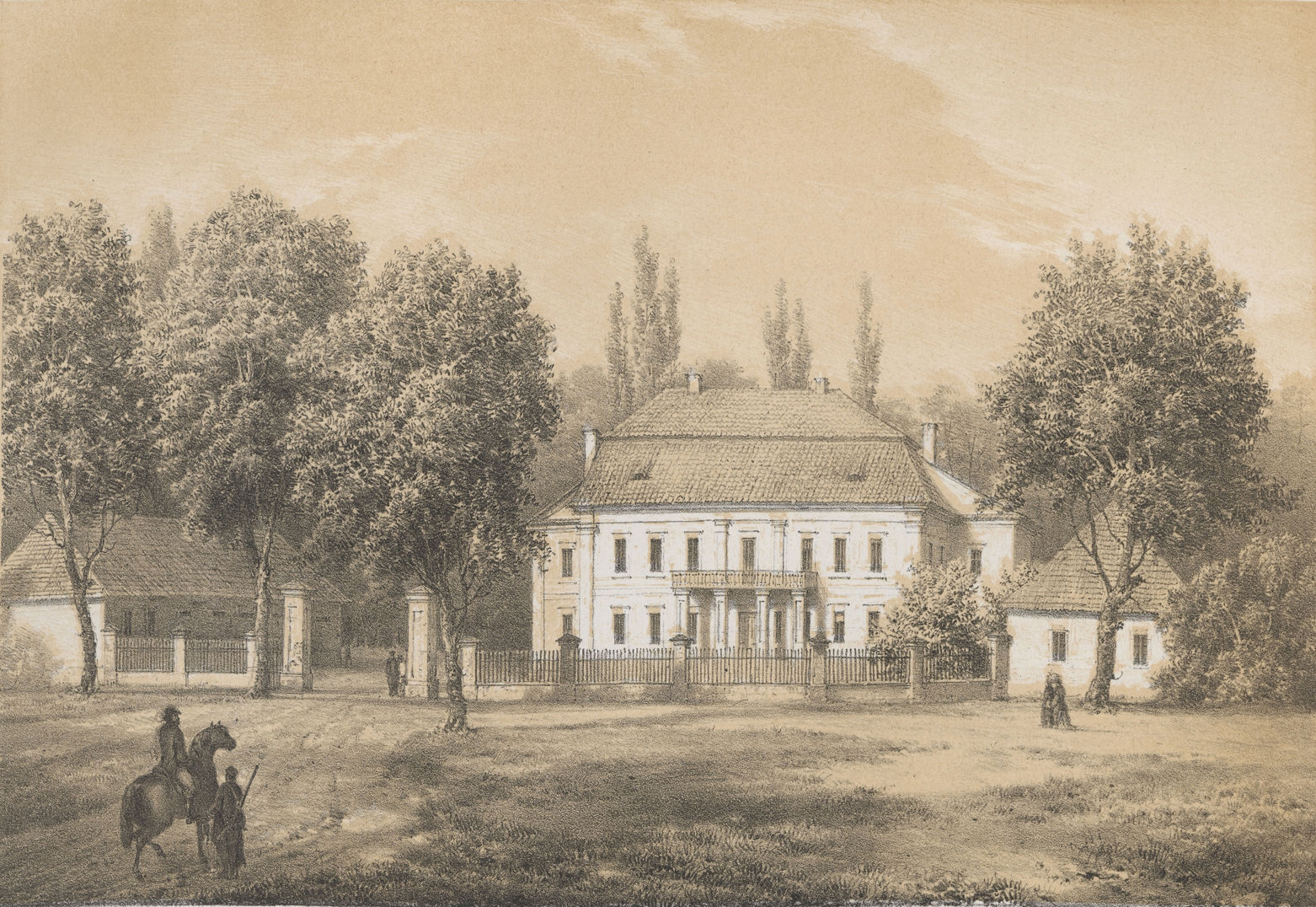 Беларуская (тарашкевіца): Скокі (Skoki), сядзіба Нямцэвічаў (Niamcevič)